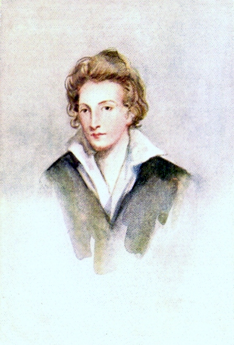 Porträt des romantischen Dichters Percy Bysshe Shelley (d 1822). Das Aquarell findet sich im Druck wiedergegeben als Frontispiz in der oben genannten Quelle.